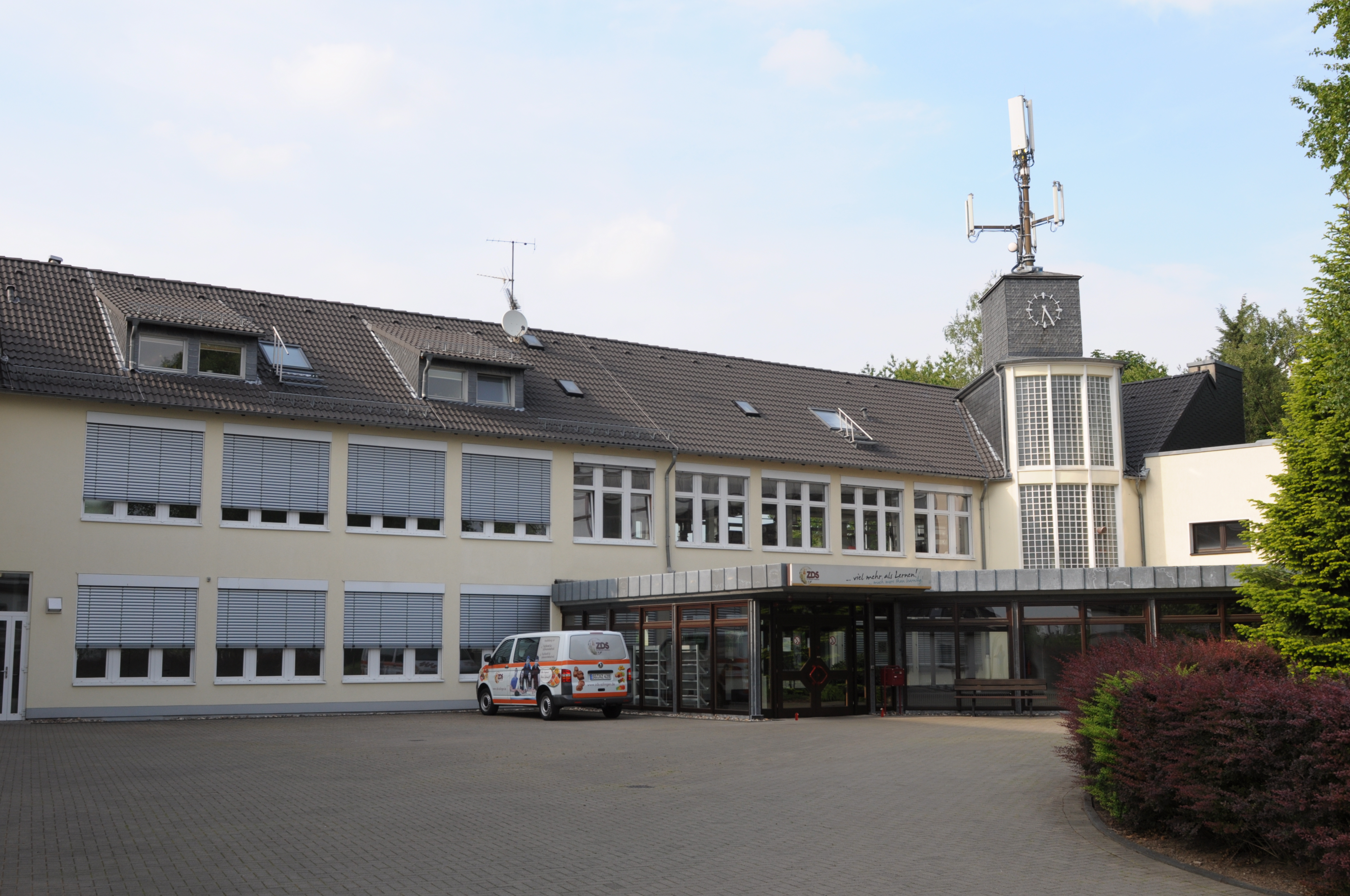 Zentralfachschule der Deutschen Süßwarenwirtschaft, De-Leuw-Straße 3-9, Solingen